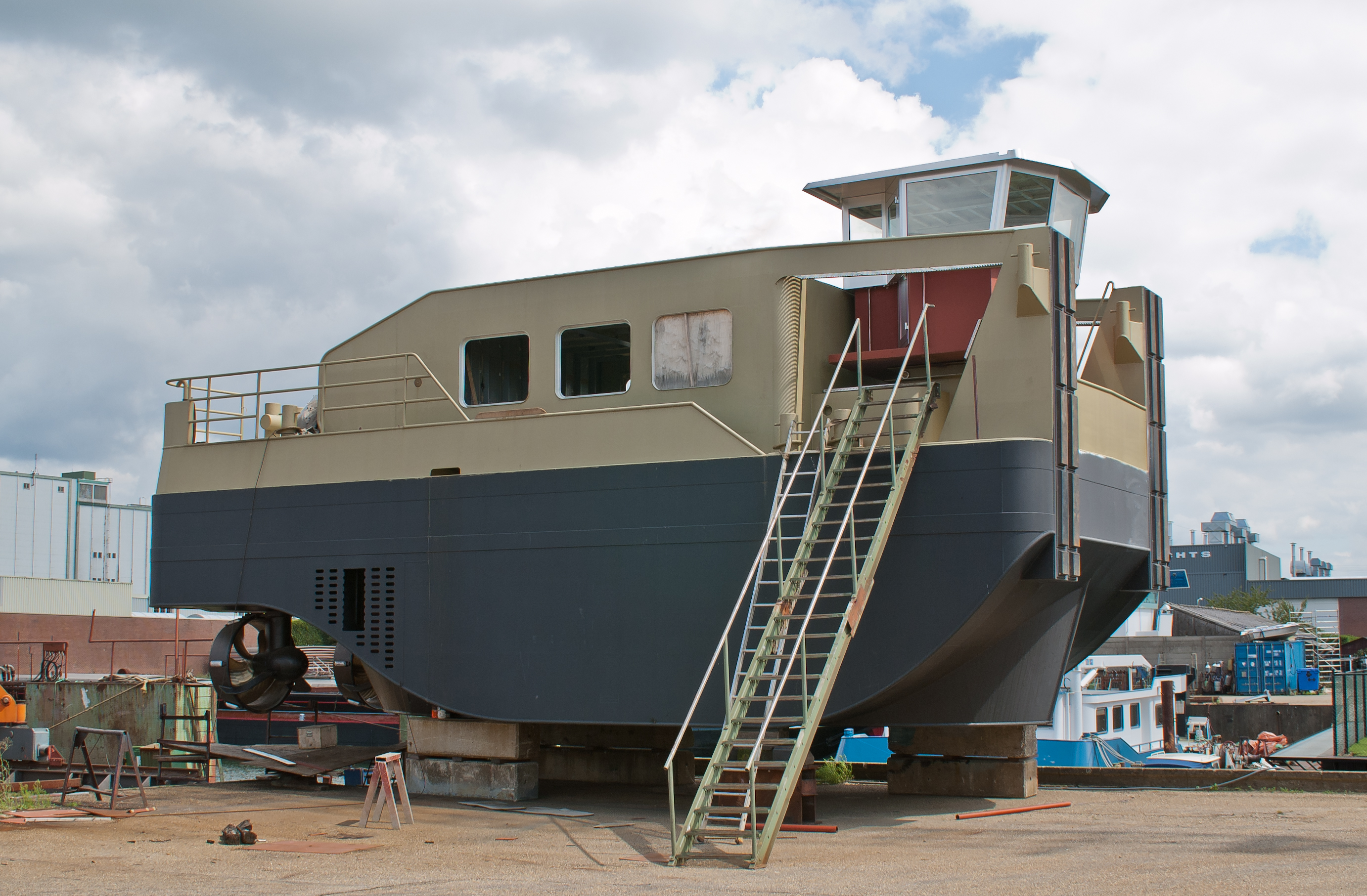 Ein Hafen-Schubboot "auf dem Trockenen" auf einer Maasbrachter Werft. Antrieb und Steuerung durch zwei Schottel-Ruderpropeller